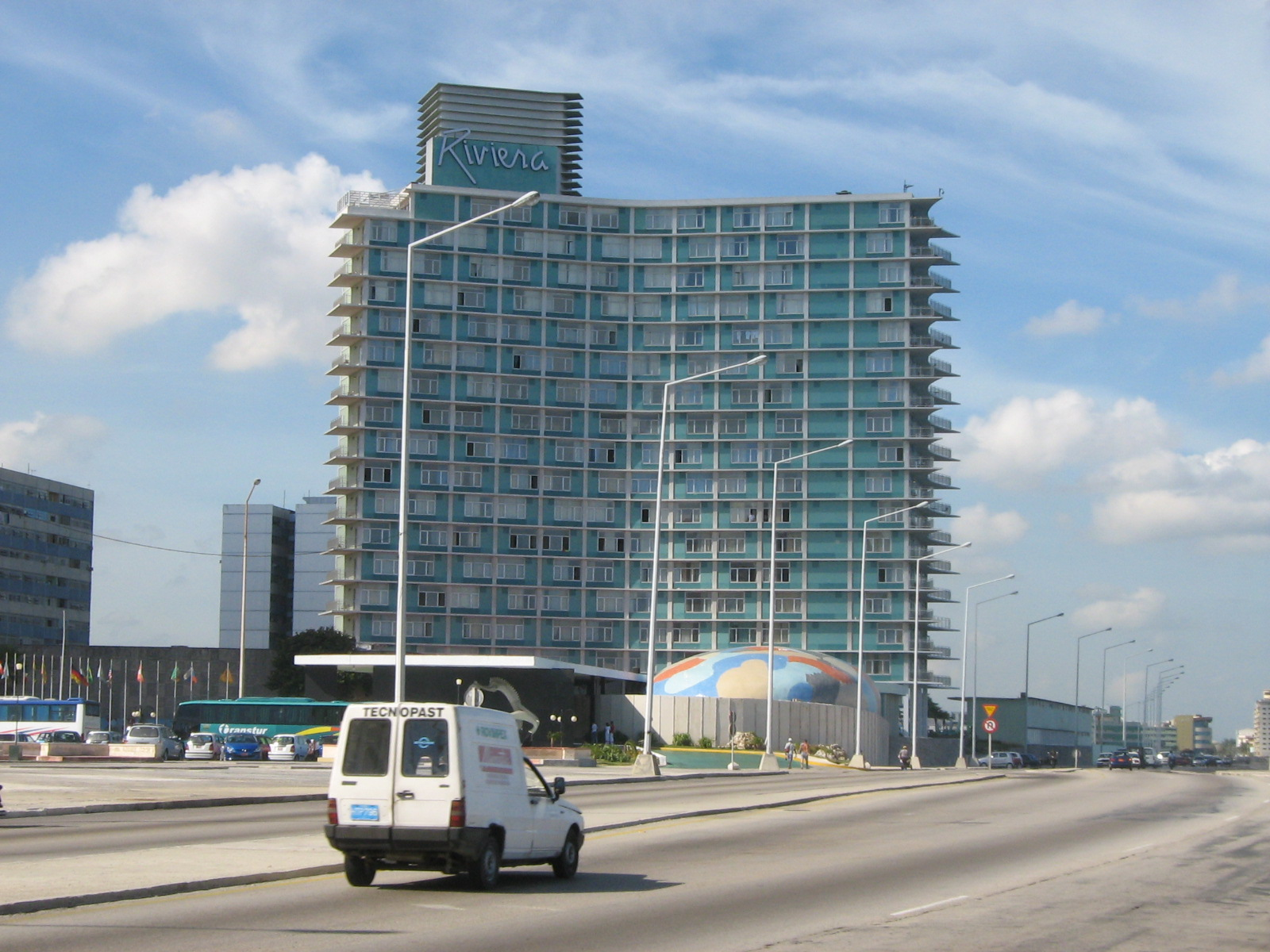 Hotel Habana Riviera en la zona habanera del vedado